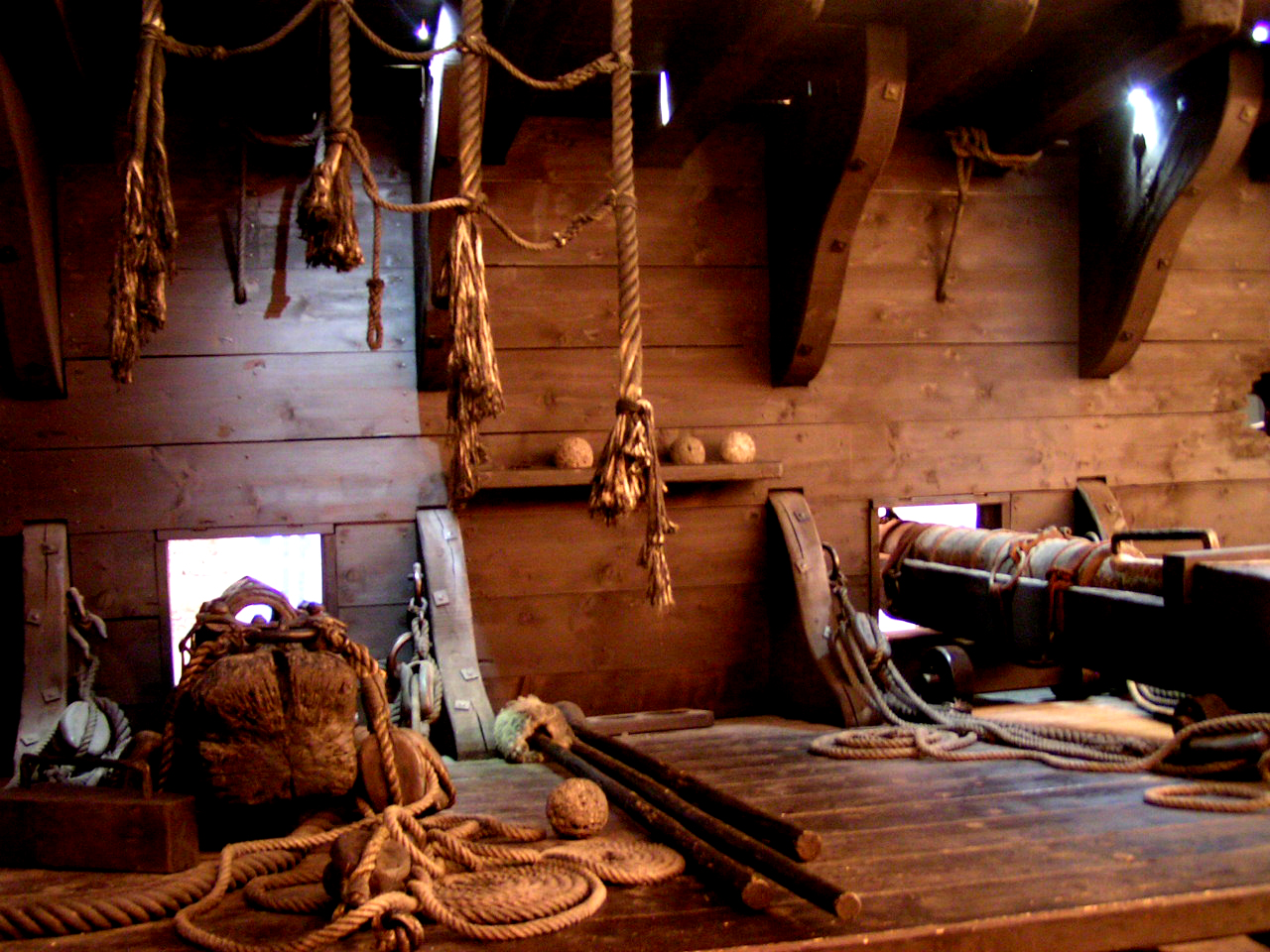 Kogge, Hanse, Restauration